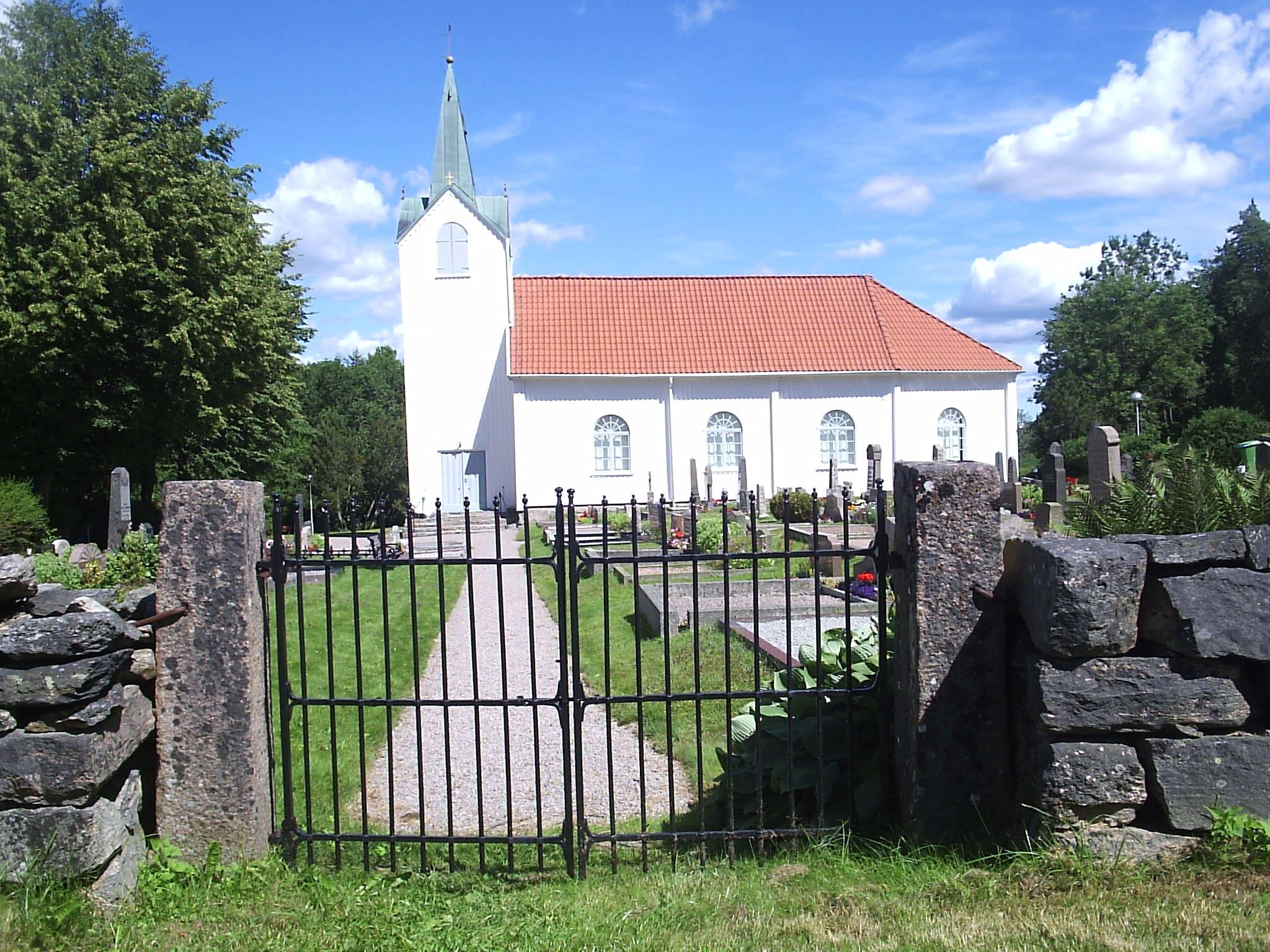 Dragsmarks kyrka